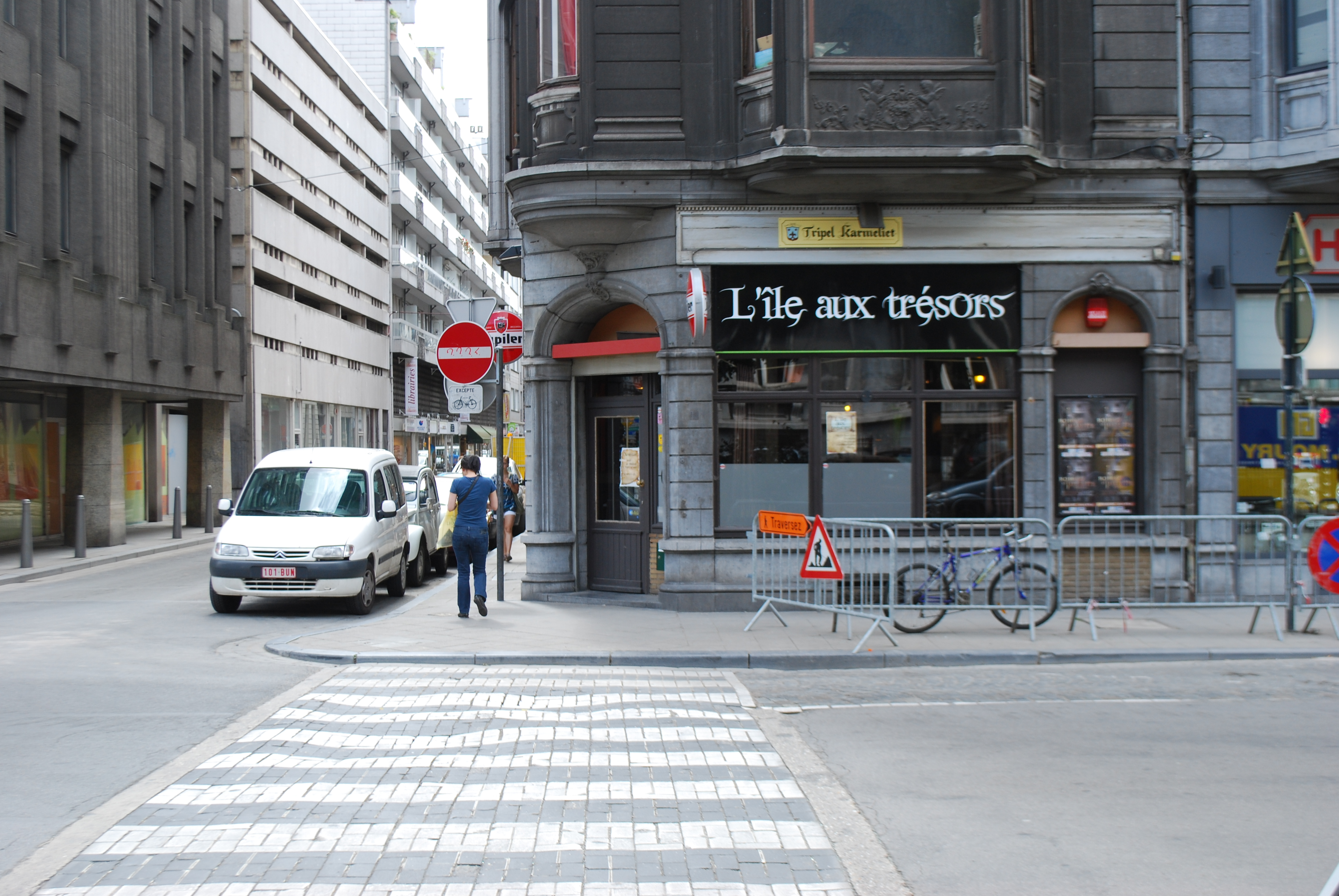 Café à l'angle de la place du 20-Août et de la rue des Carmes à Liège.